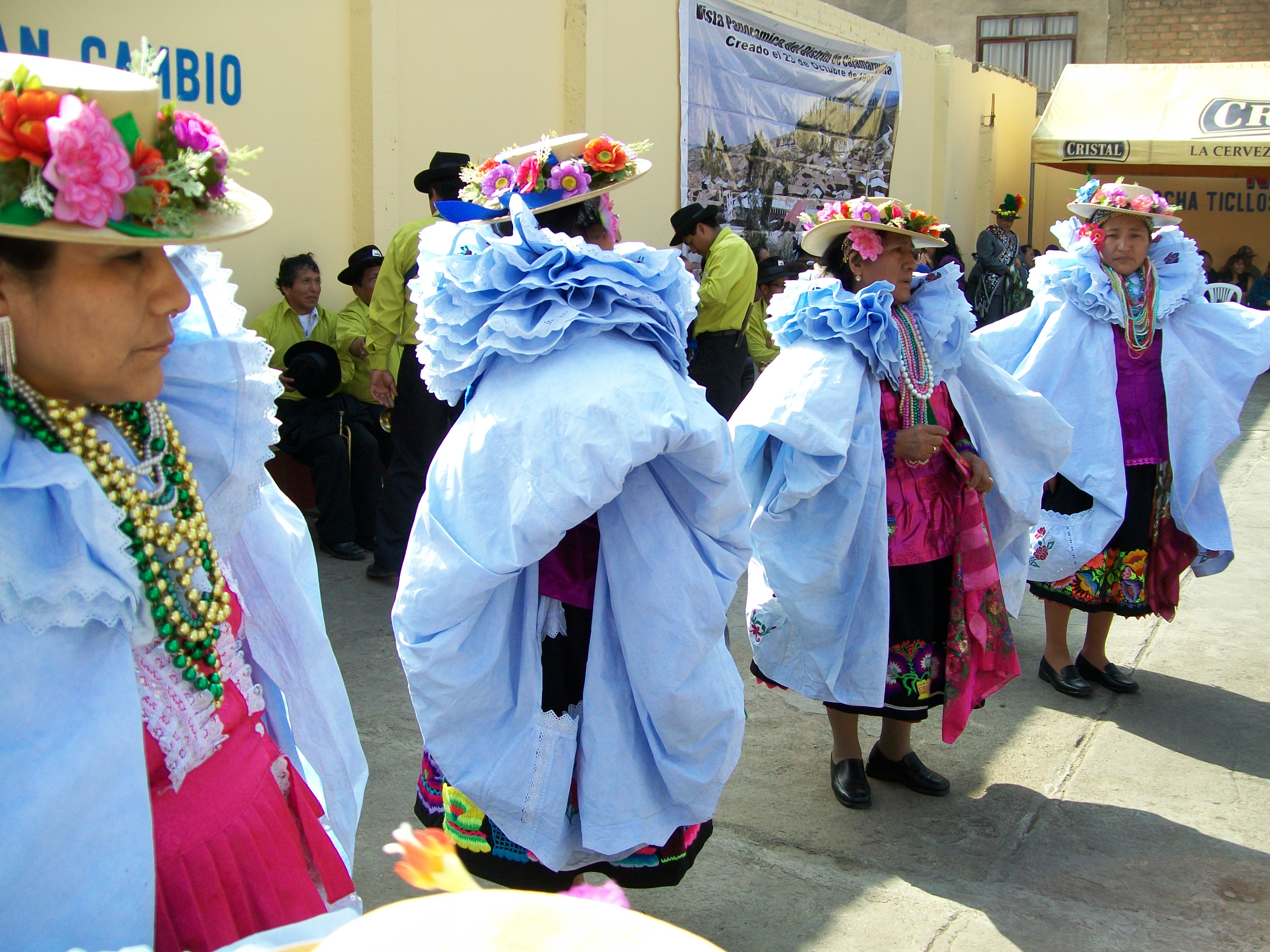 Fiesta Costumbrista País : Perú Fotógrafo:© Edgar Amador Espinoza Montesinos